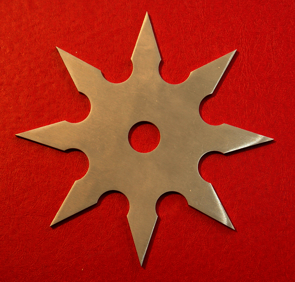 Αστέρι Νίντζα - Σούρικεν, ανήκει στο είδος των Hira Shuriken